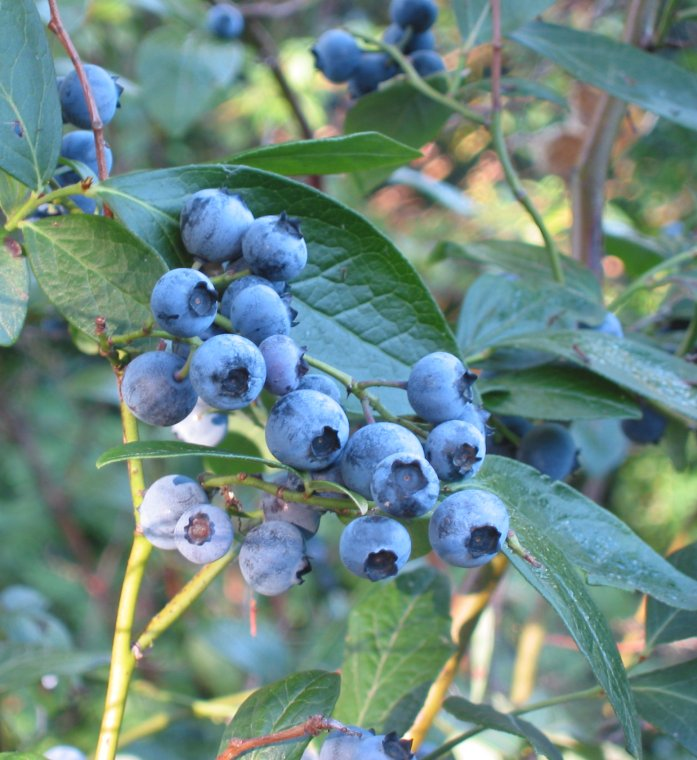 zelfgemaakte foto van vruchten van de blauwe bes; half juli